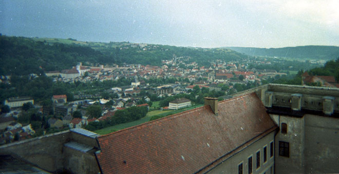 Eichstätt - Deutschland/BY (Aufgenommen etwa Anfang der 1990er Jahre)